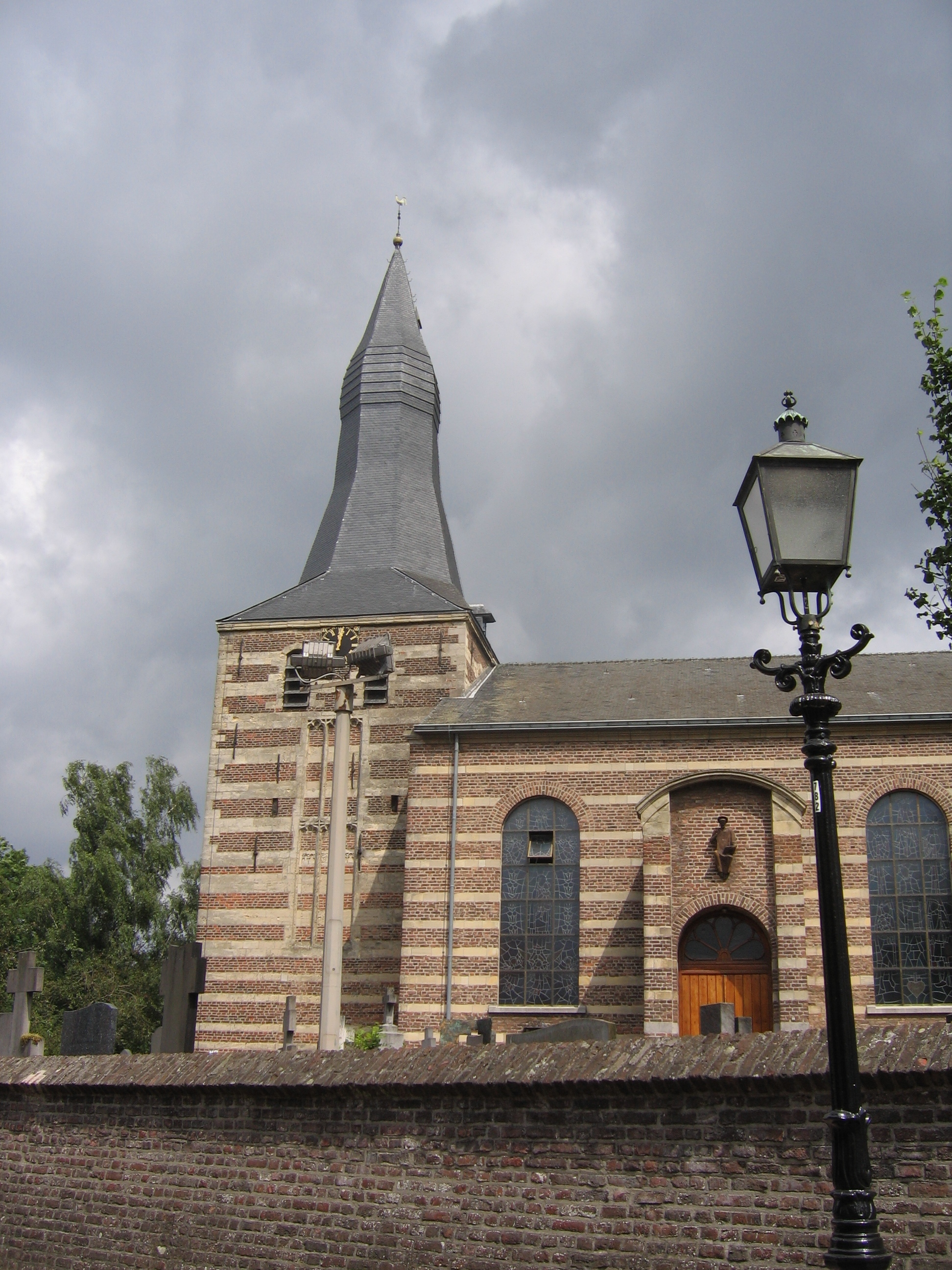 foto gemaakt door JHM Verbiesen, de maker heeft toestemming gegeven om de foto te plaatsen op wikipedia